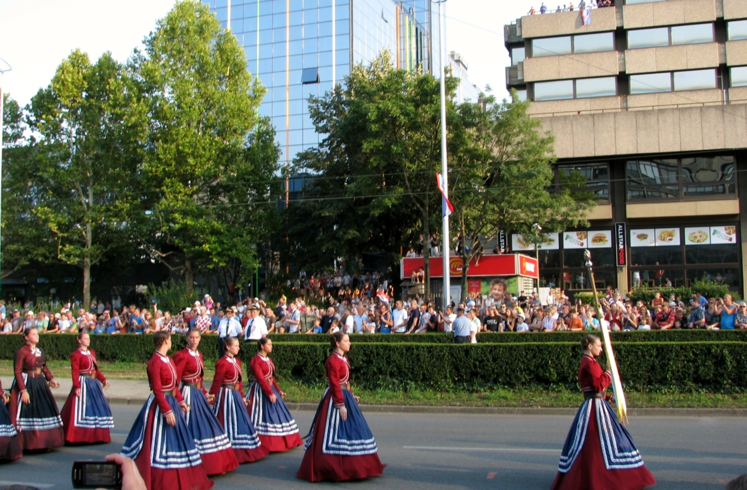 Križevačka djevojačka straža na svečanom mimohodu u Zagrebu, 4. kolovoza 2015.